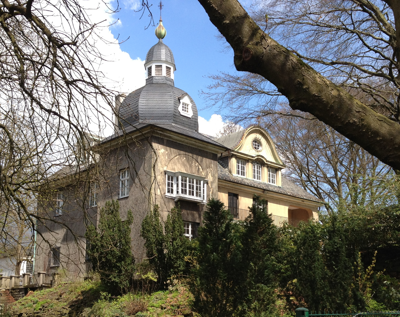 Wunderschöne Fabrikantenvilla im Herzen der Stadt Lüdenscheid.